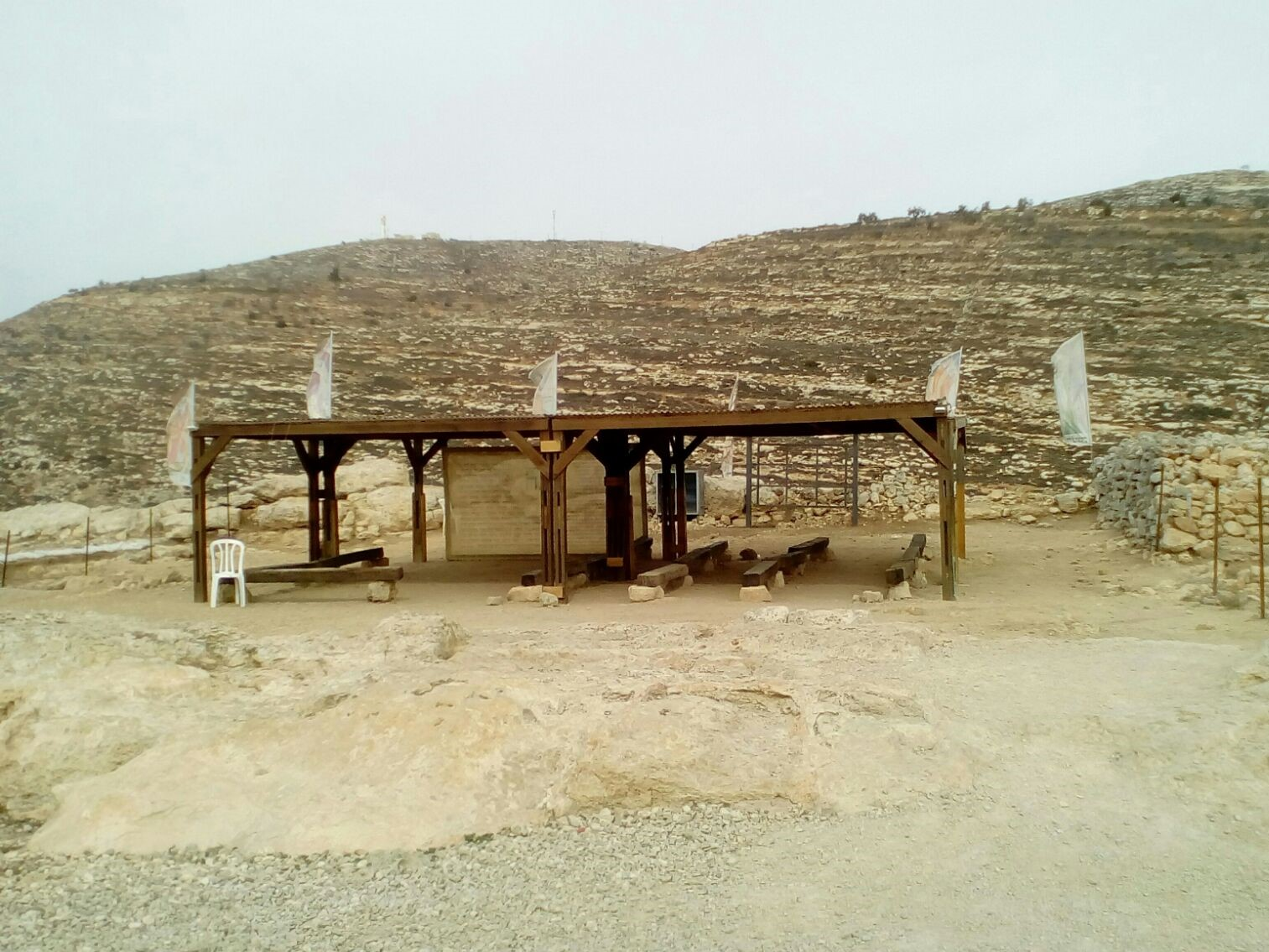 שחזור משוער של מיקומו ומידותיו של משכן שילה, הסמוך לשילה המקראית